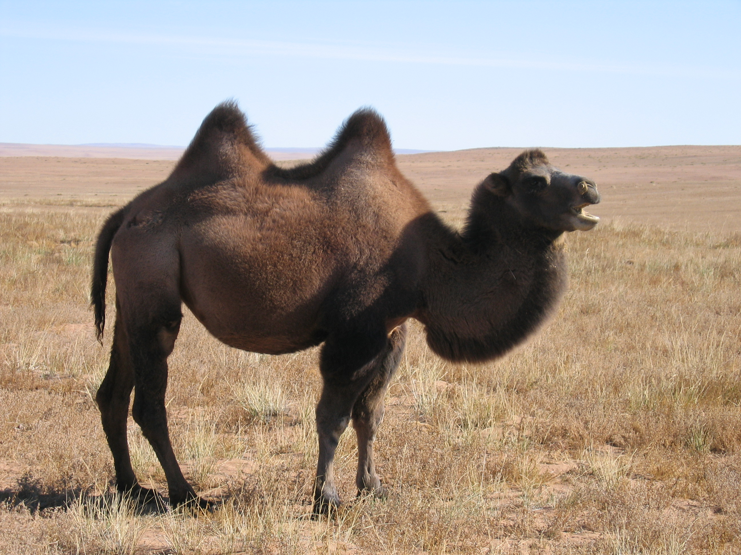 Chameau de Bactriane